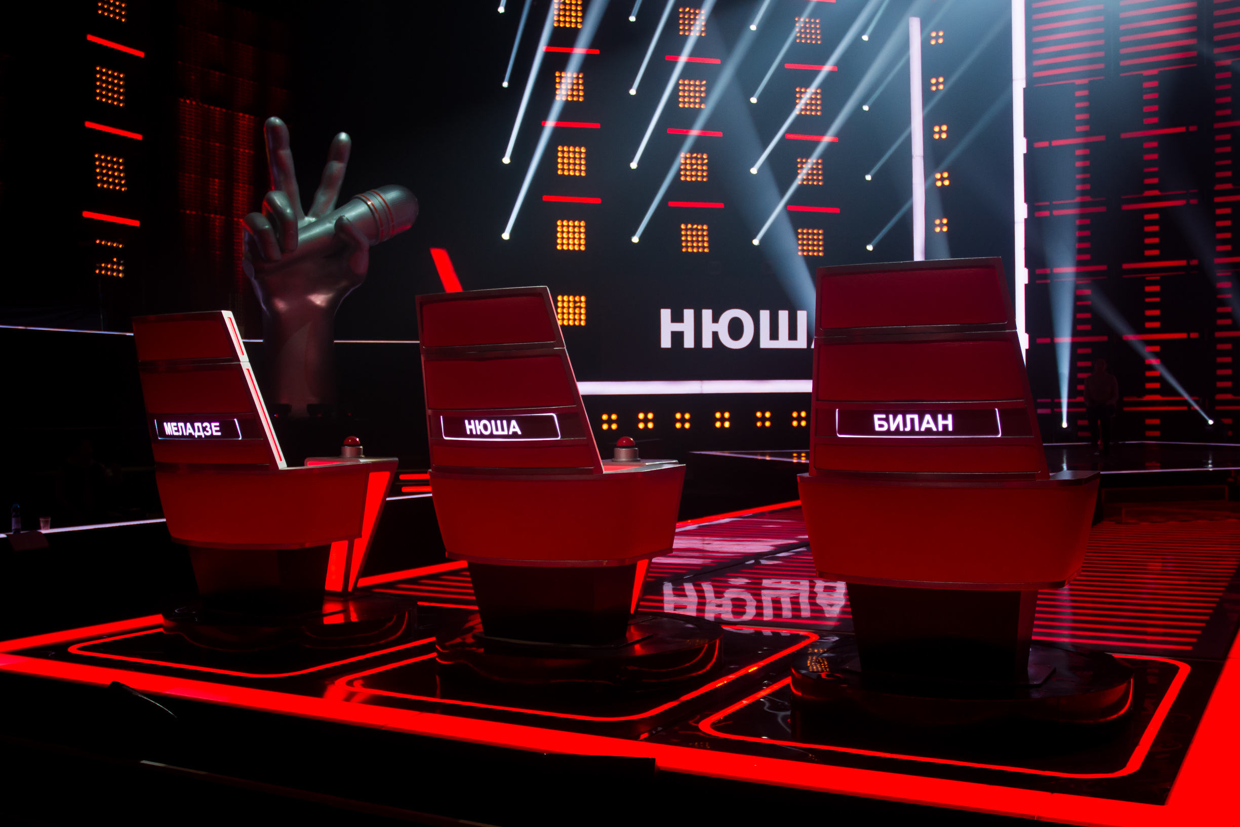 Кресла наставников четвёртого сезона «Голос. Дети»